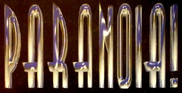 Logo hry Paranoia! znázorněné na krabici.